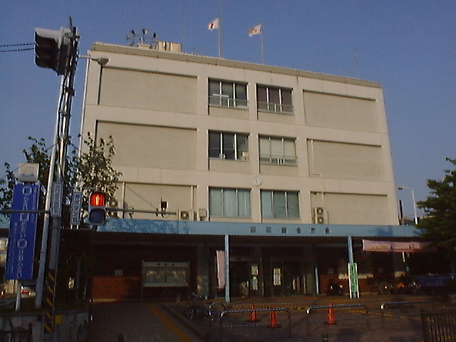 Nishi-ku Ward Office, Nishi-ku, Yokohama, Kanagawa, Japan (西区役所)